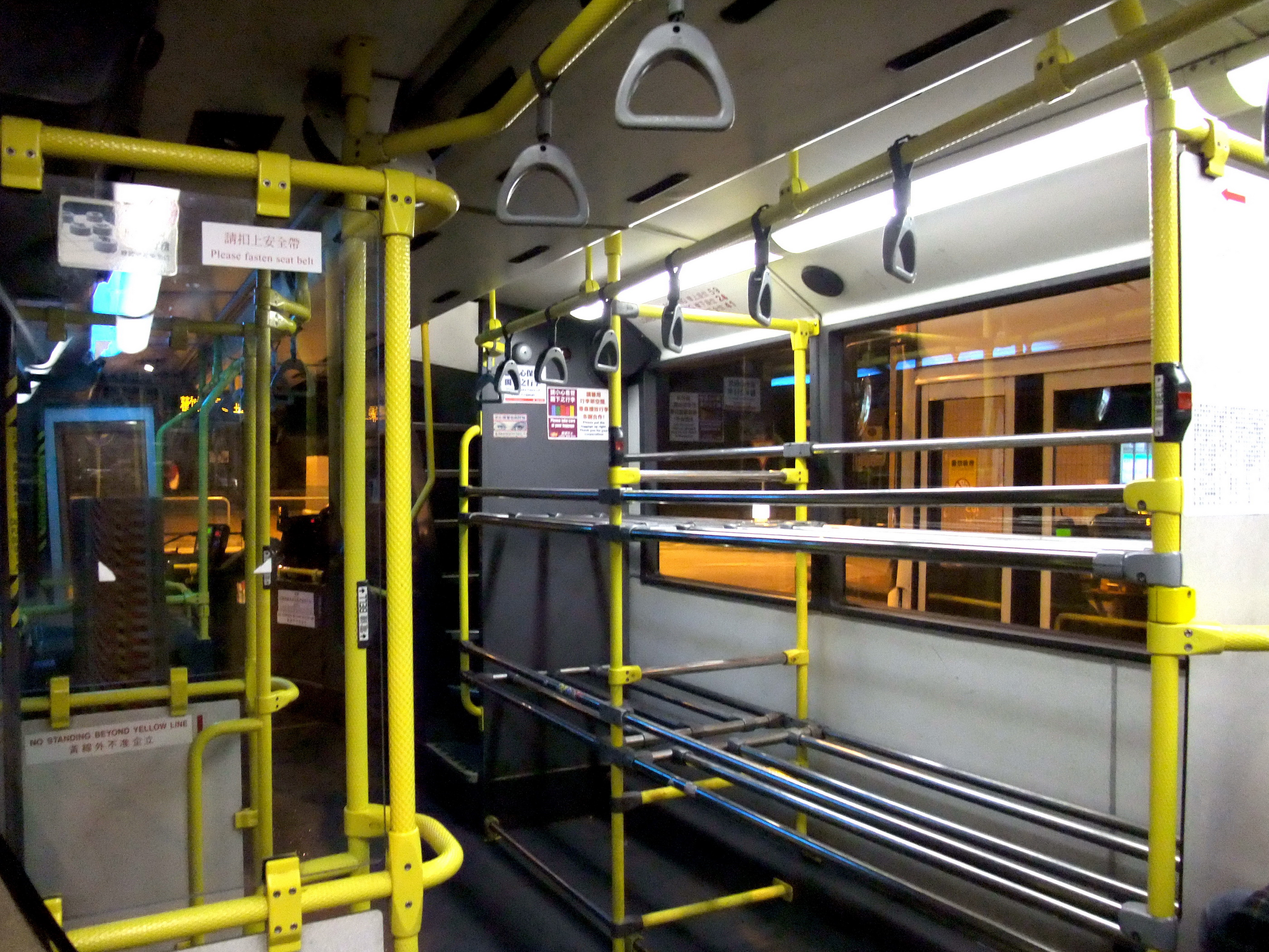 龍運E31線巴士的行李架